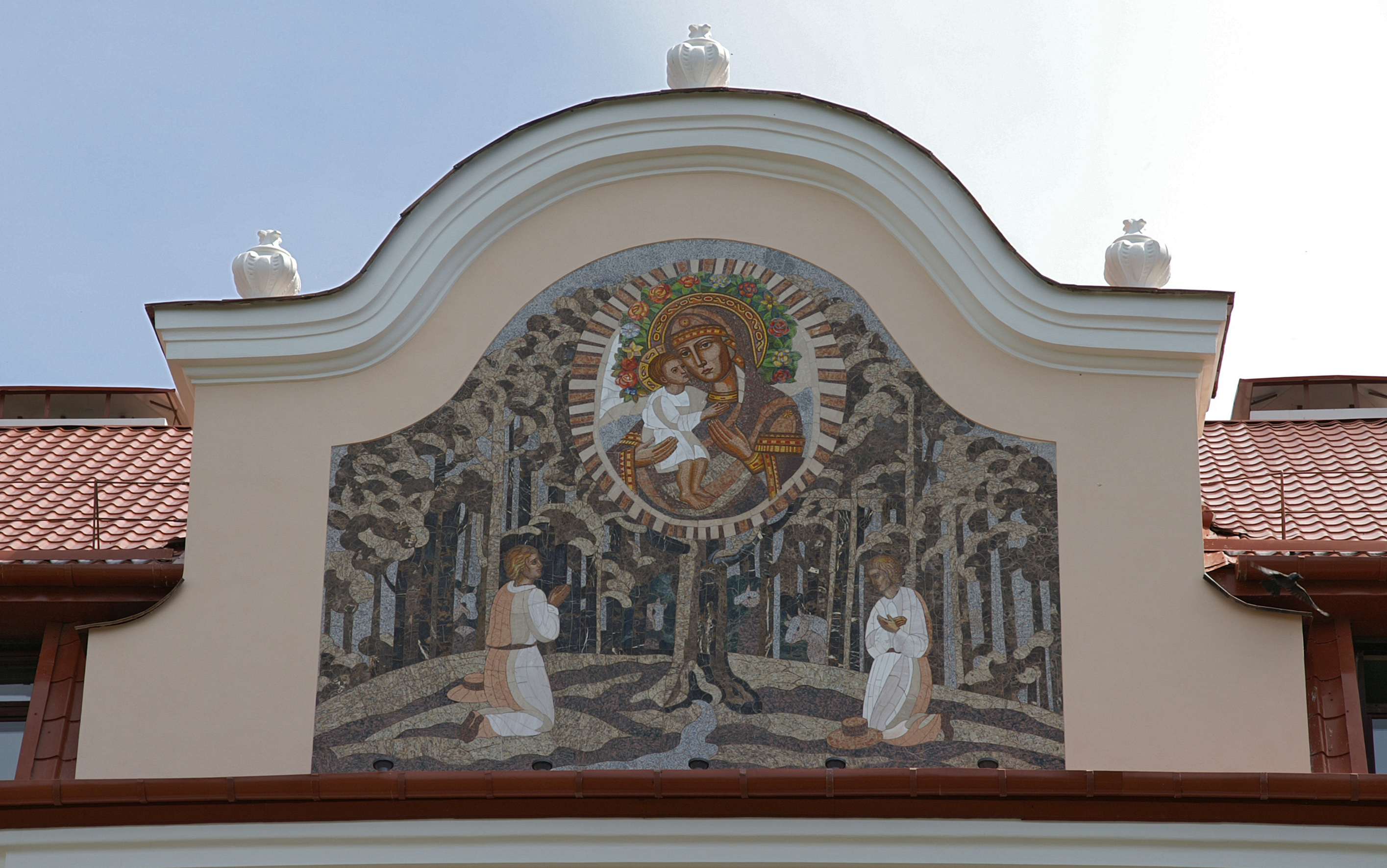 Беларуская (тарашкевіца): Ансамбаль Сьвята-Усьпенскага манастыра:Усьпенскі сабордэкаратыўнае аздабленьне:росьпіс у консе «Спас Пантакратар», арнамэнтальны дэкор на скляпеньнях паўднёвай сакрысьціі і ўсіх нэфаў, іканастас, бакавыя алтарыБогаяўленская царкваКрыжаўзьвіжанская царквазваніцабудынак сэмінарыіжылы корпусгаспадарчыя пабудовы. в. Жыровічы This is a photo of Belarusian heritage monument. Reference number: 411Г000537 ( WLM)